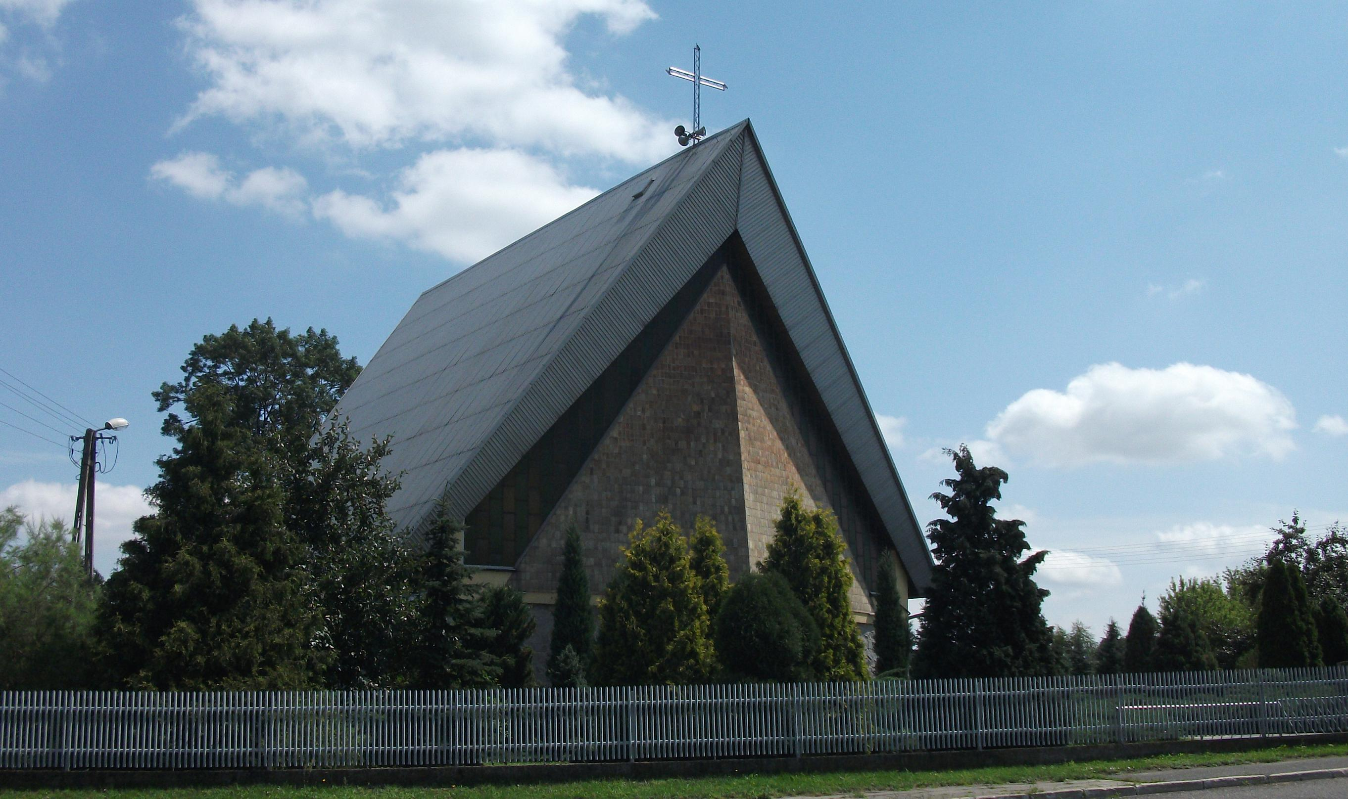 Kościół parafialny pw. św. Andrzeja Boboli w Masłowicach k/Wielunia